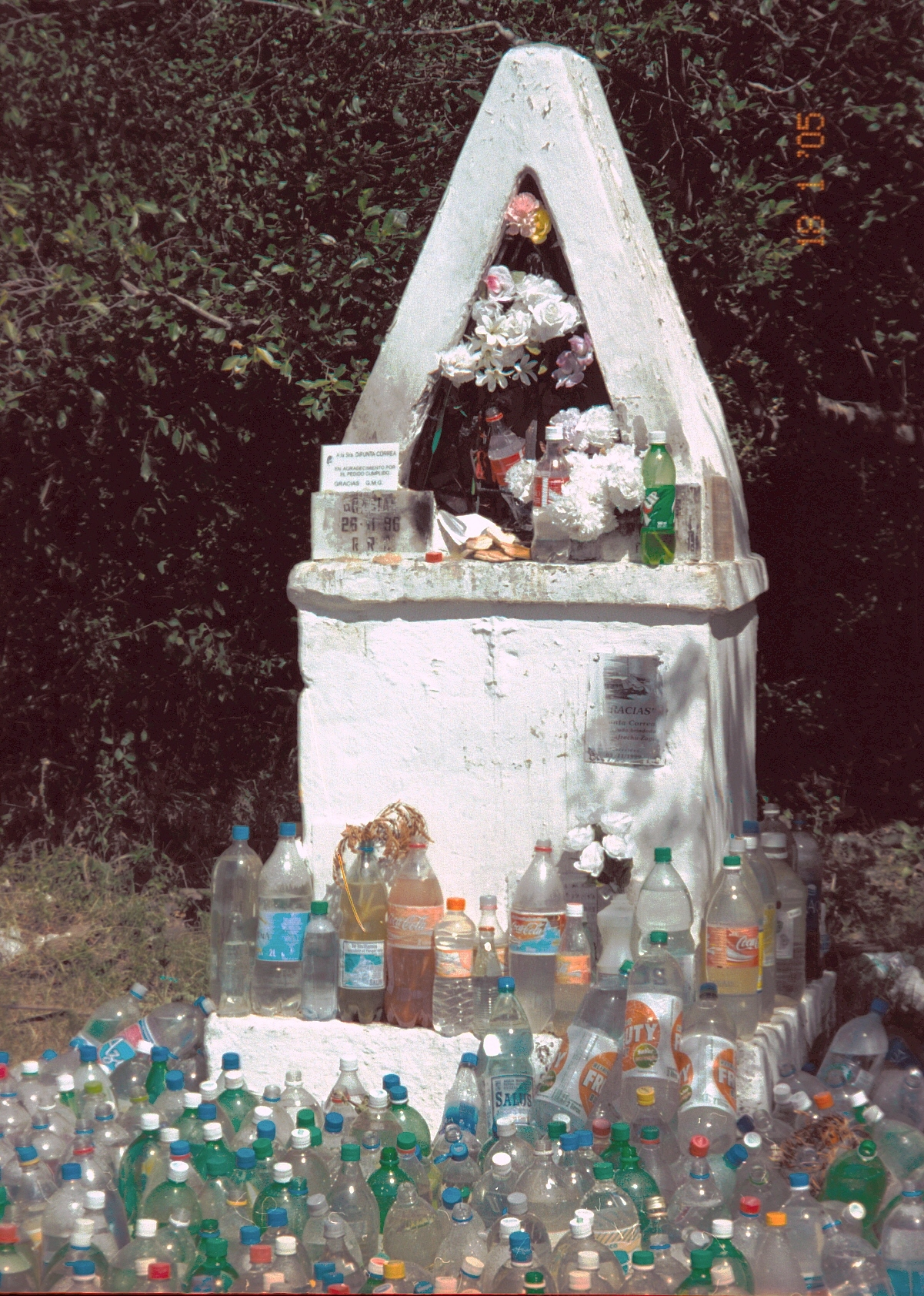 Santuario dedicado a la Difunta Correa, ubicado entre las ciudades de Tacuarembó y Paso de los Toros, Uruguay. La Difunta Correa es una figura mítica de Argentina.